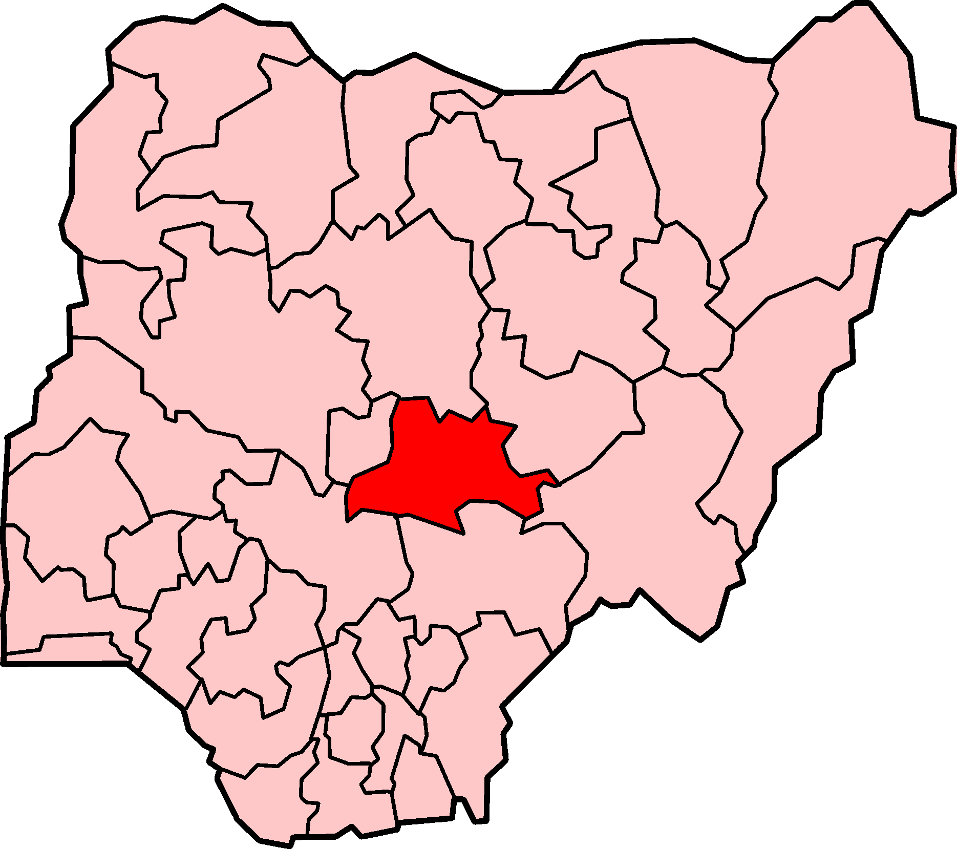 Localização do estado de Nasarawa na Nigéria.